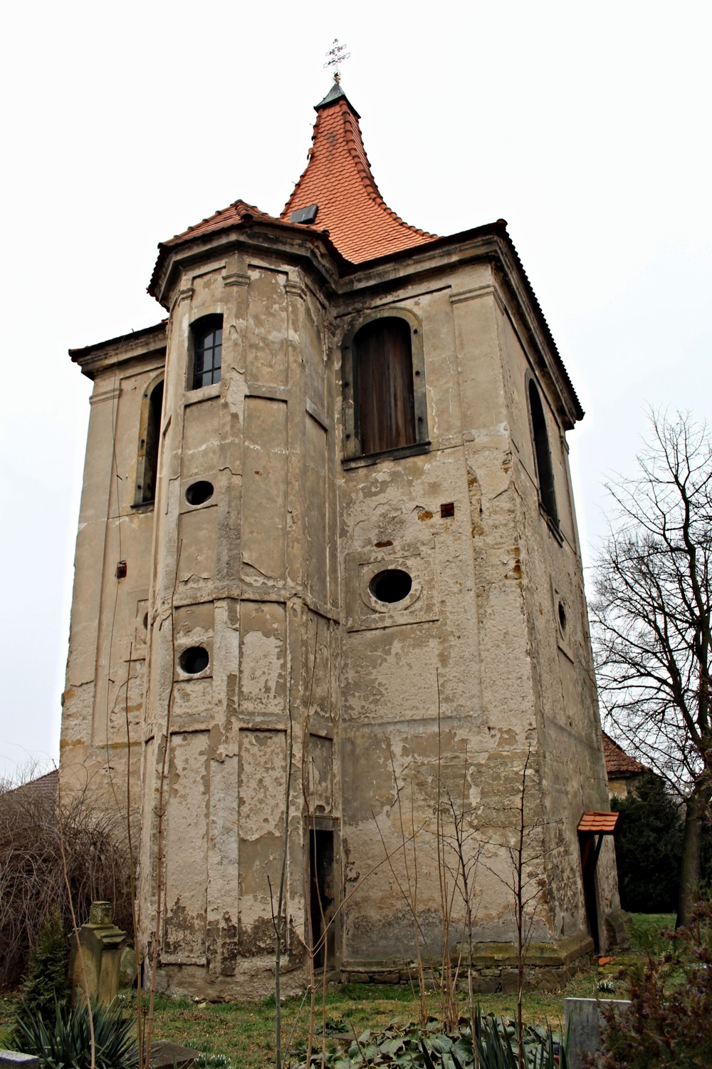 Svémyslice kostel sv. Prokopa